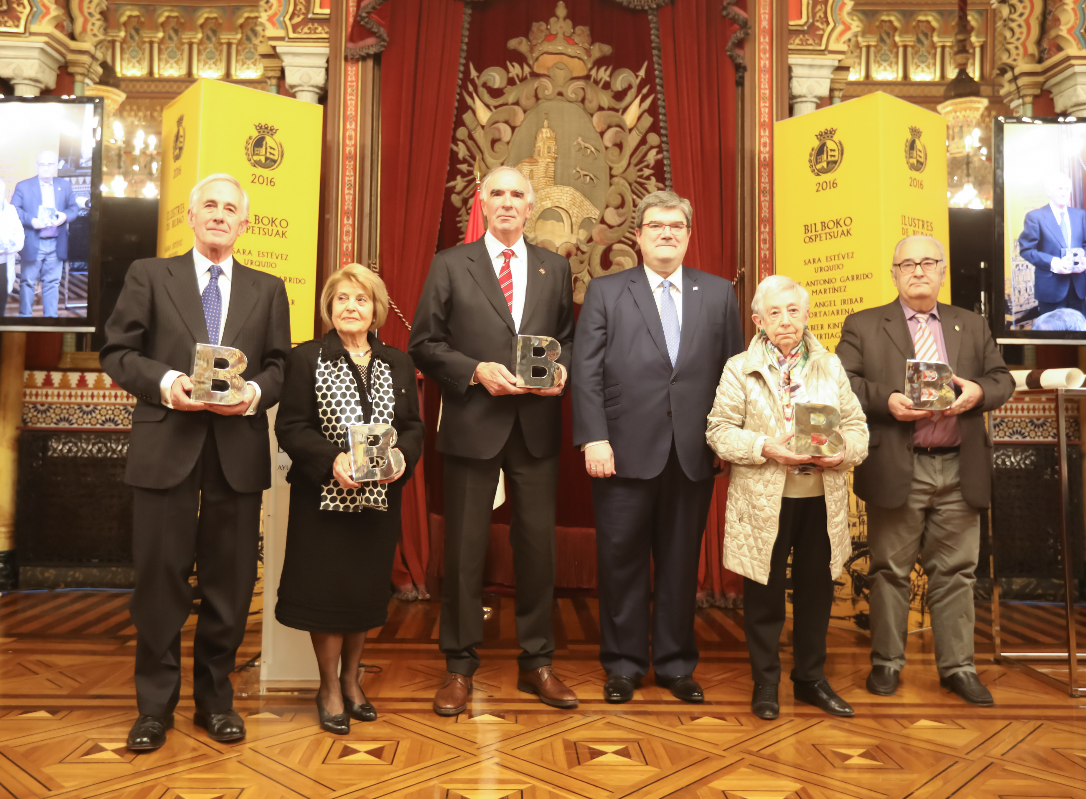 2016ko Bilboko ospetsuak izendatu dituzte: José Angel Iribar, Sara Estévez, José Antonio Garrido, Begoña Rueda eta Xabier Kintana.